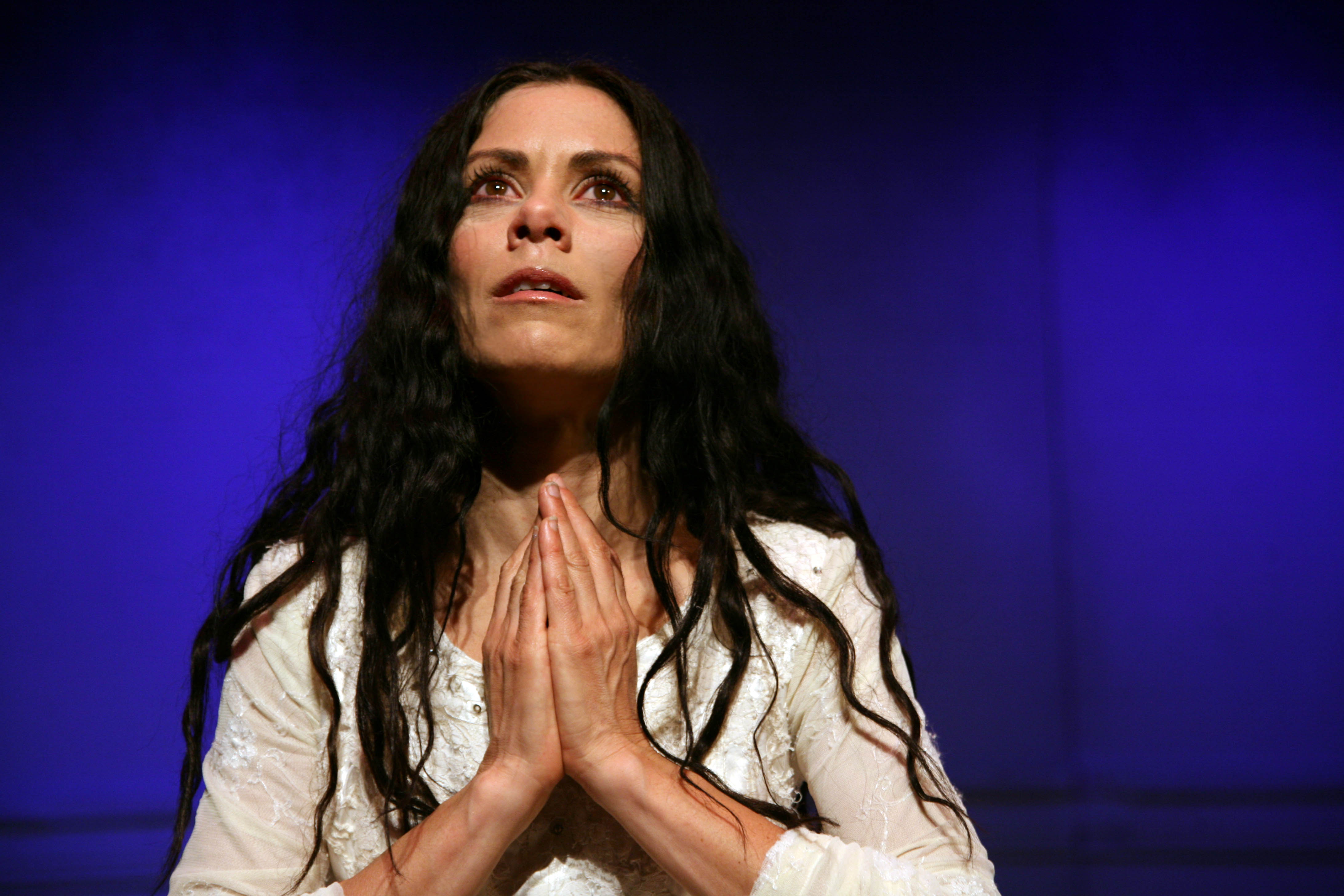 מיקי פלג רוטשטיין בתפקיד אנטיגונה